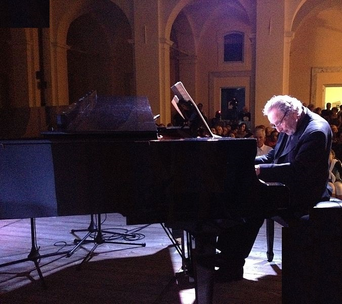 Il Maestro Bacalov in concerto al MuMi per il Festival Alessandro Cicognini 2014